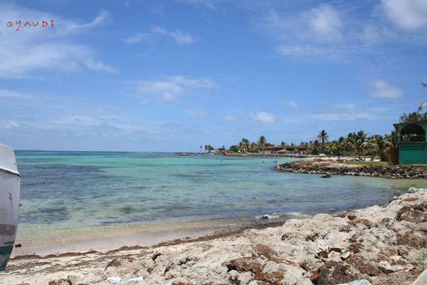 Vista Panoramica de Corn Island